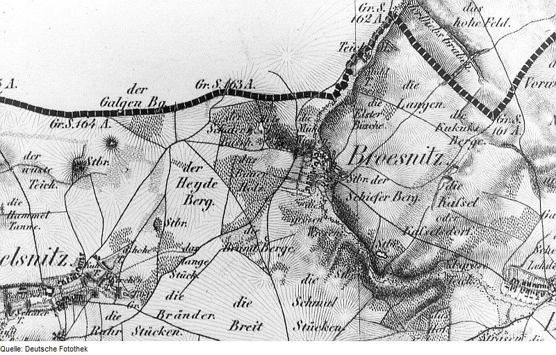 Original image description from the Deutsche Fotothek Weißig a. Raschütz-Brößnitz. Oberreit, Sect. Großenhain, 1841/43